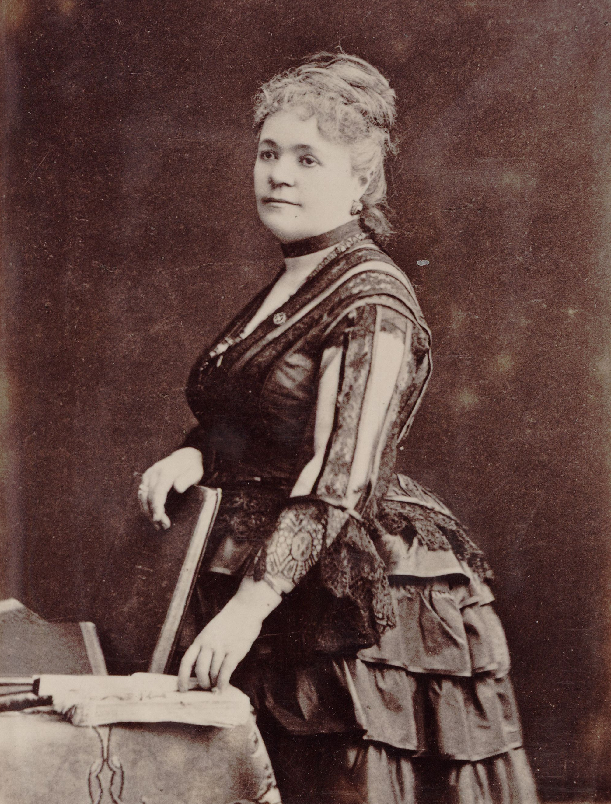 Madame Rosine Laborde, de l'Opéra par H. Bourgoin, Paris.